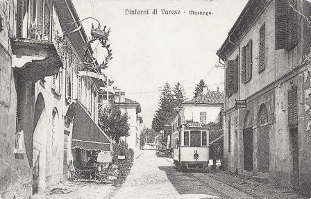 Masnago, tram